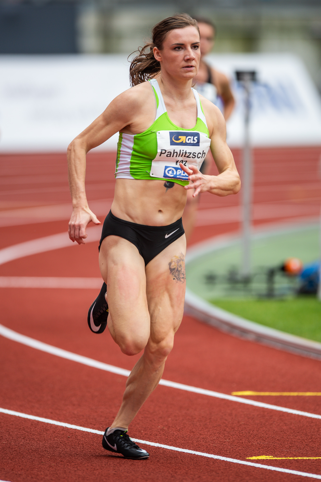 400-Meter-Lauf,DLV,Deutsche Leichtathletik Meisterschaften 2018,Deutscher Leichtathletik-Verband,Karolina Pahlitzsch,Max-Morlock-Stadion,SV Preußen Berlin